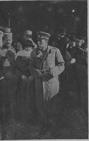 Général Palitzine (attaché militaire en France) de la délégation russe se rendant à la Consulta, réunion inter-Alliés de Rome commençant le 6 janvier 1917.